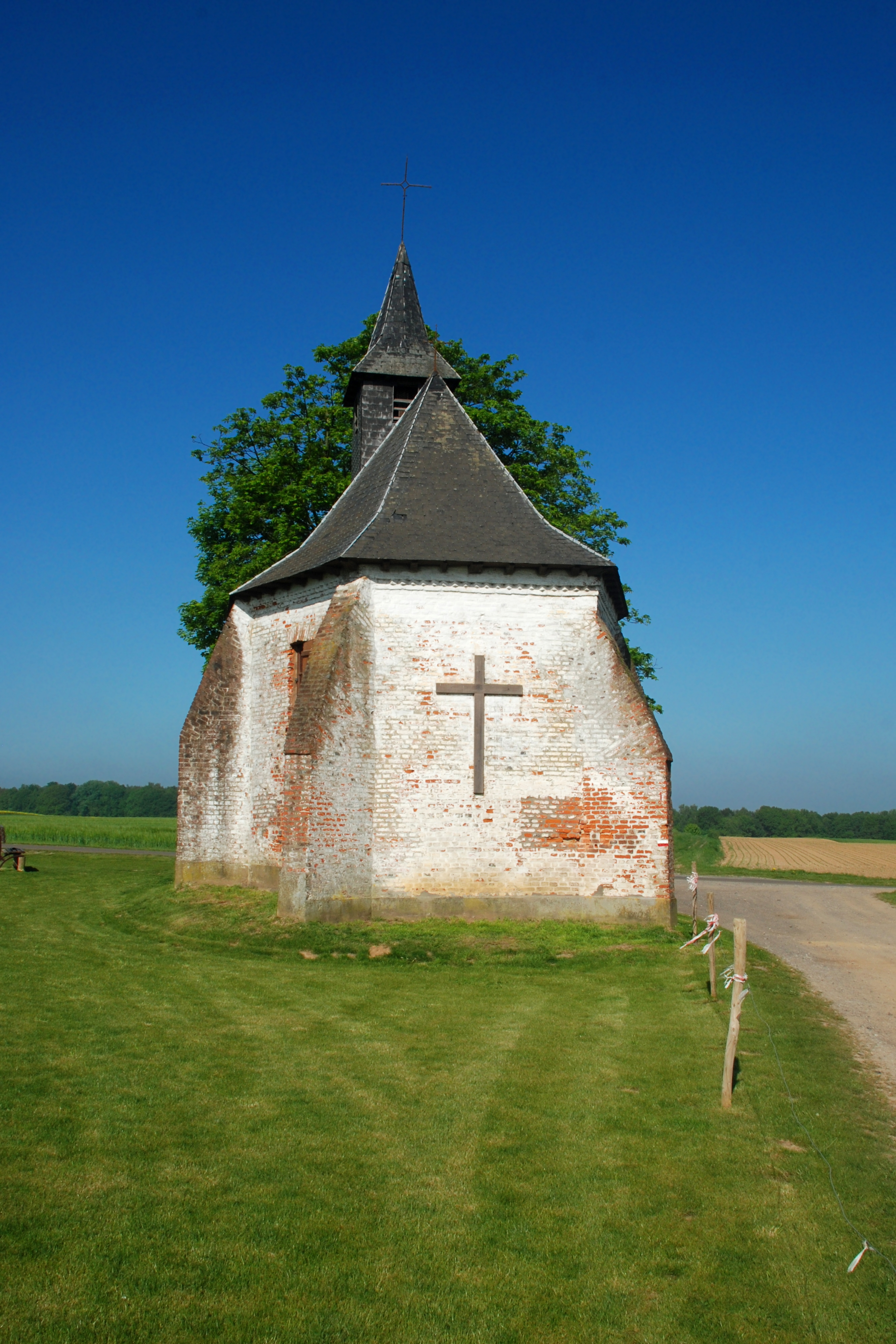 Belgique - Bousval - Chapelle du Try-au-Chêne